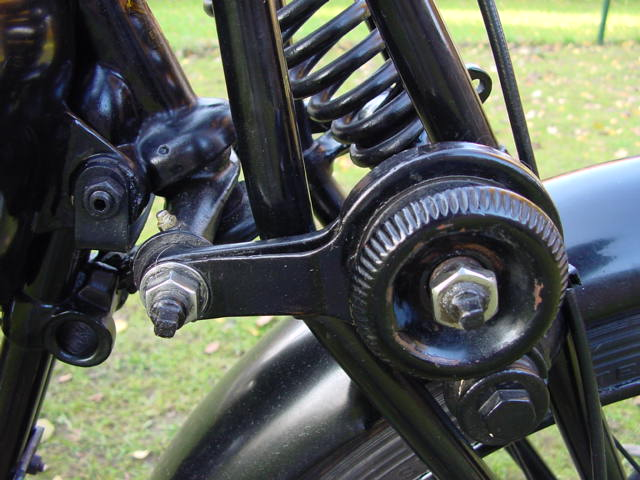 Reibungsdämpfer